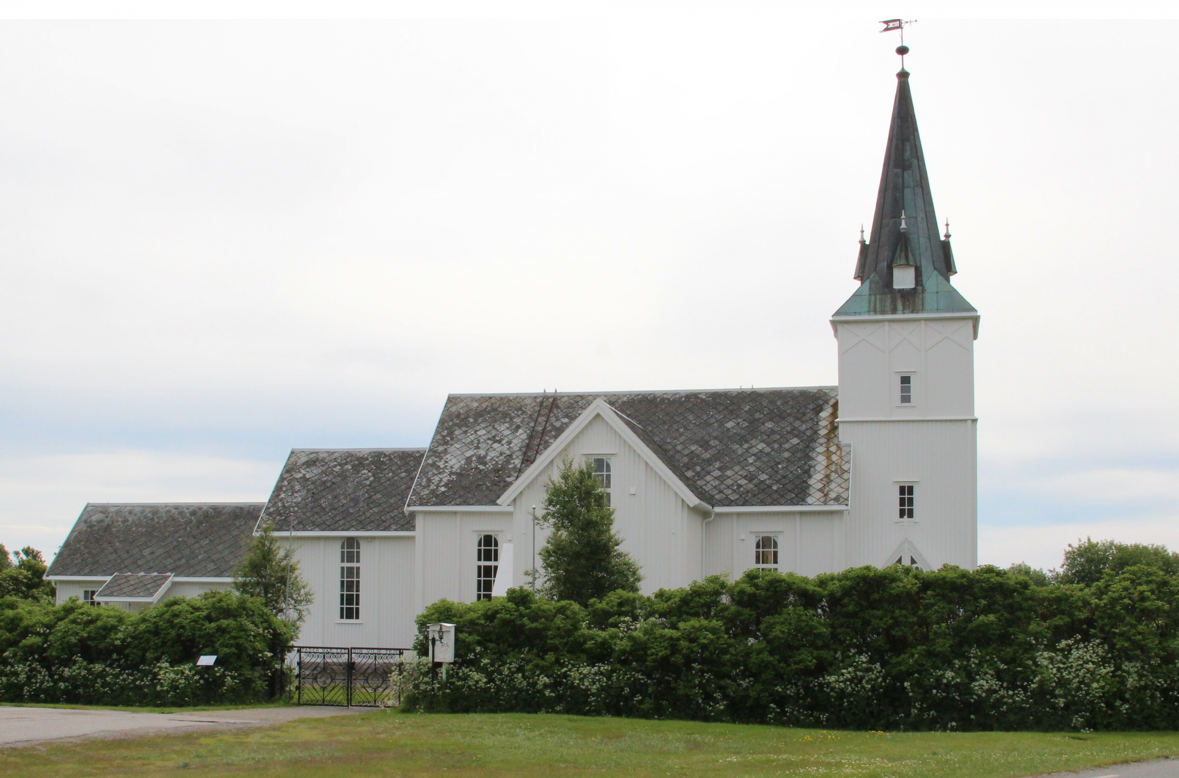 Lødingen kirke. Foto: Bertha Elisabeth Aarø, fra RIksantikvarens Kulturminnesøk.